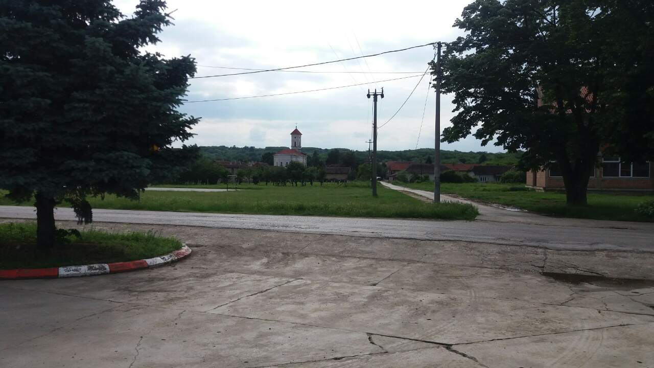 Српски (ћирилица): Црква Вазнесења Господњег и фудбалски терен у Средњеву